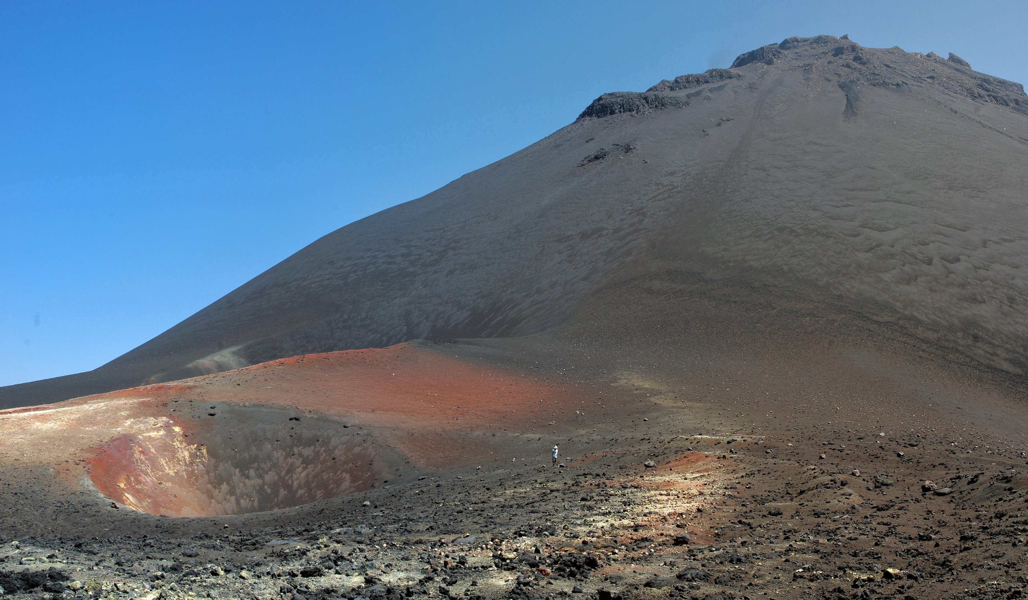 Gasaustritt-Schlote des Pico Perqueno (2000 m ü.NN.) rechts des Gipfel des Pico (2829 m ü.NN.)